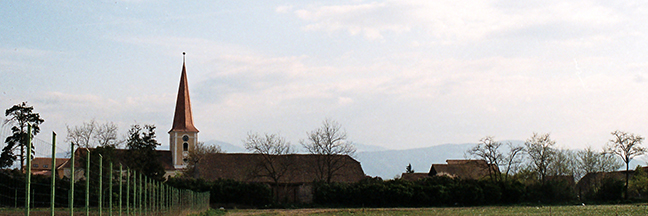 Şelimbăr (German: Schellenberg, Hungarian: Sellenberk), Romania